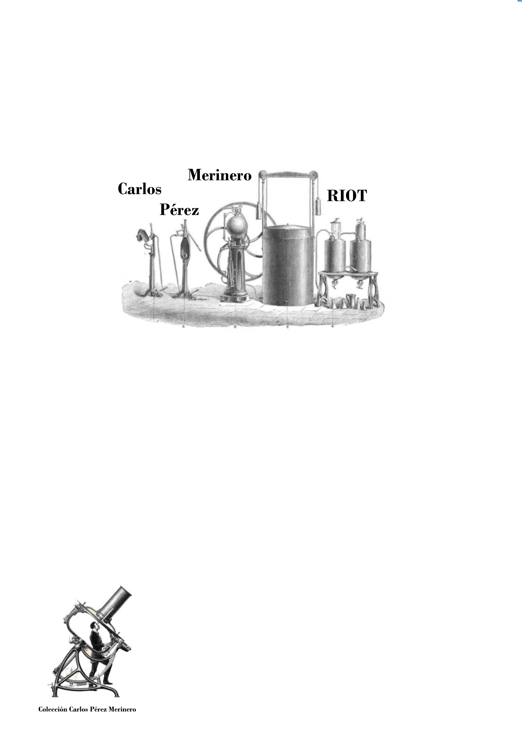 Imagen Portada RIOT